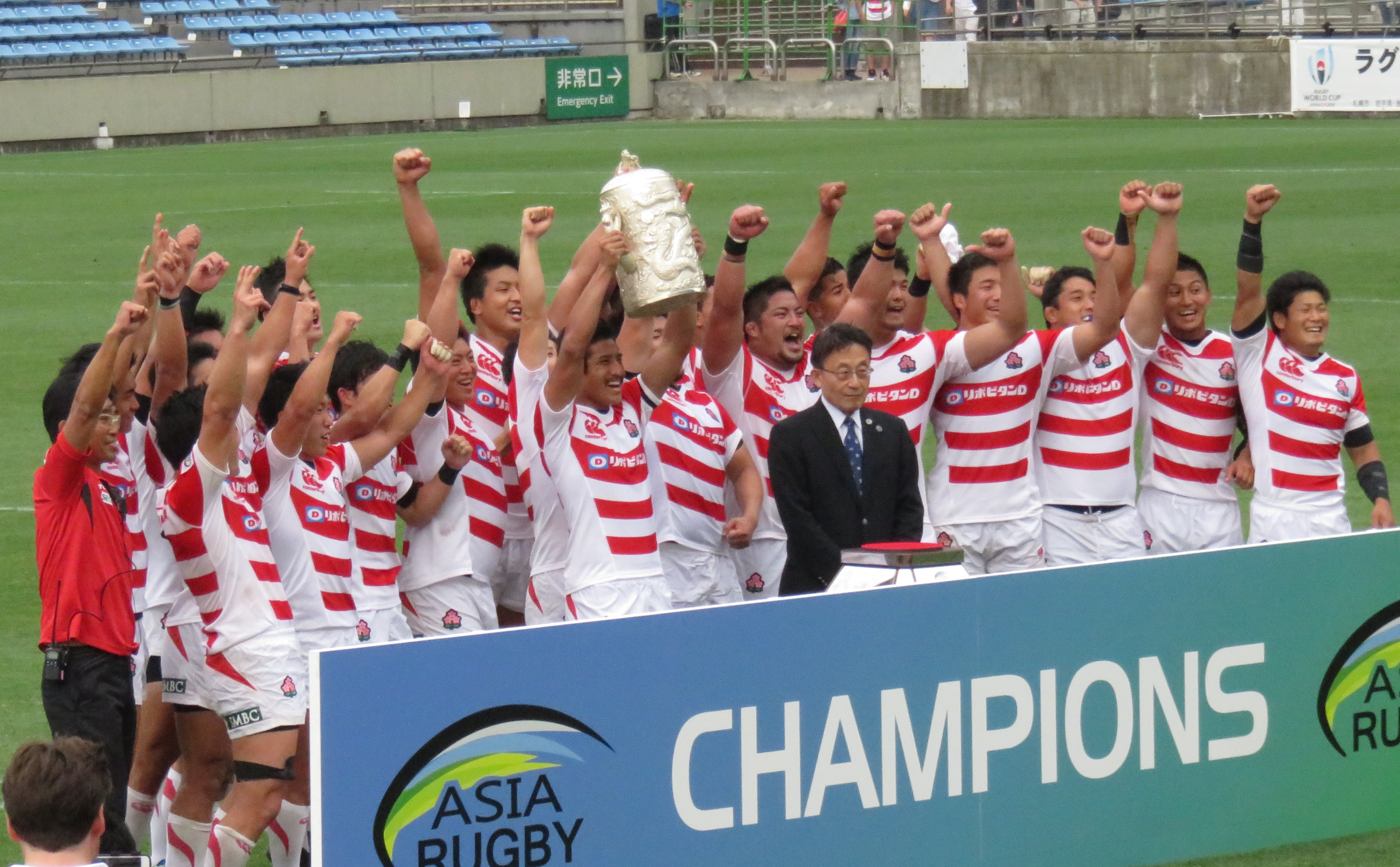 アジアラグビーチャンピオンシップ2016 優勝カップアップの場面